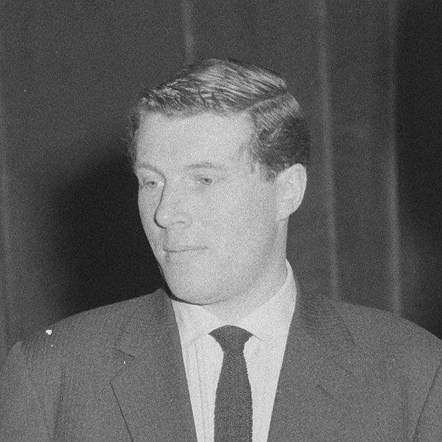 Jos van der Valk (links) in gesprek met Vico Torriani.